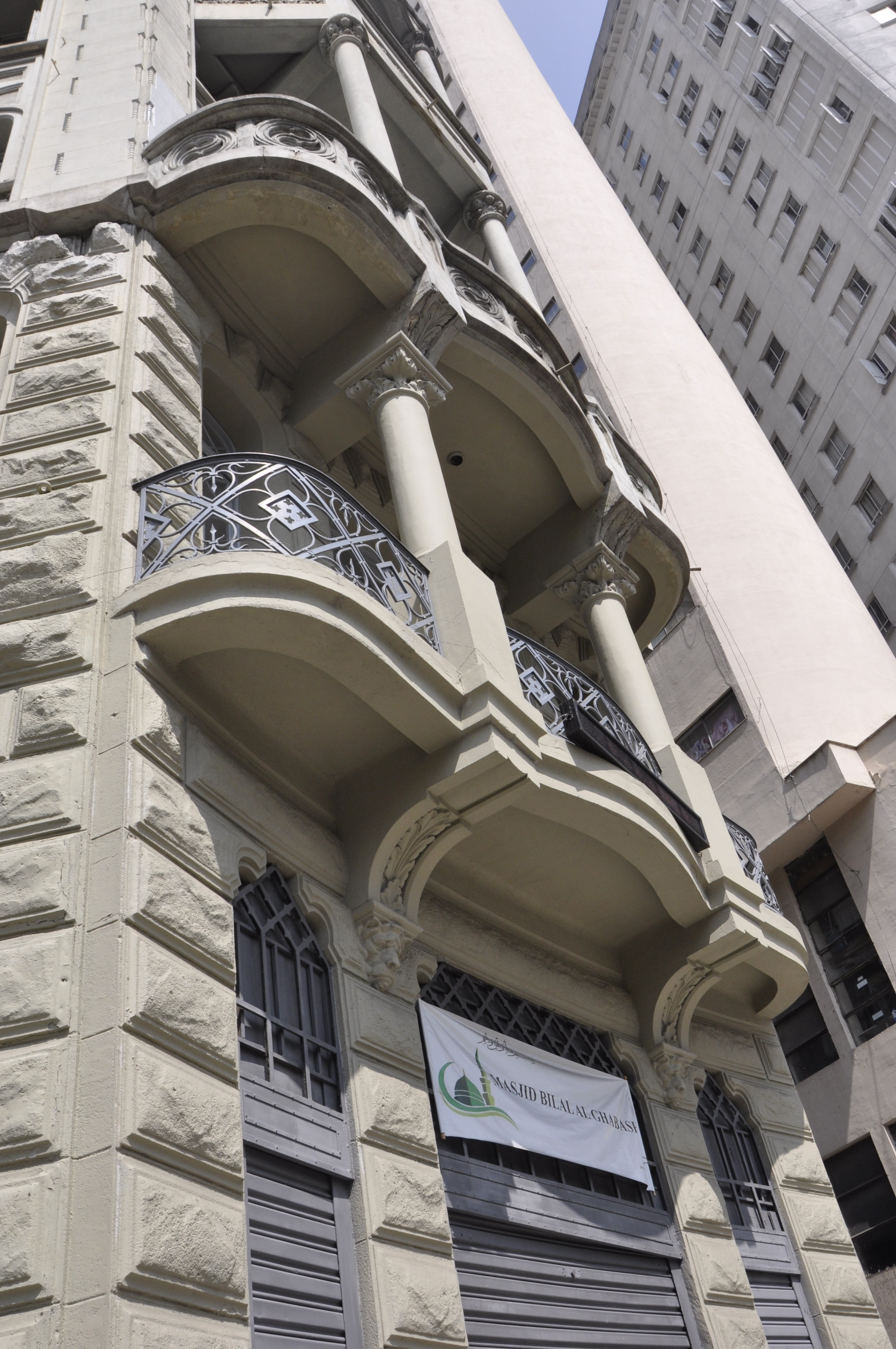 Detalhe da varanda do Edifício Riachuelo, na frente do prédio